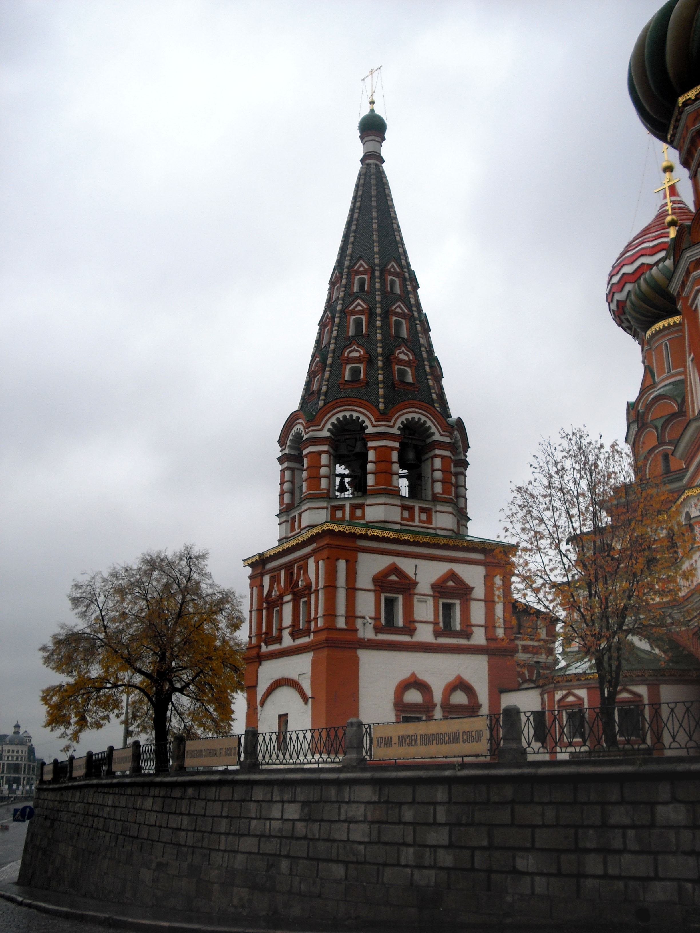 Pyhän Vasilin katedraalin kellotapuli